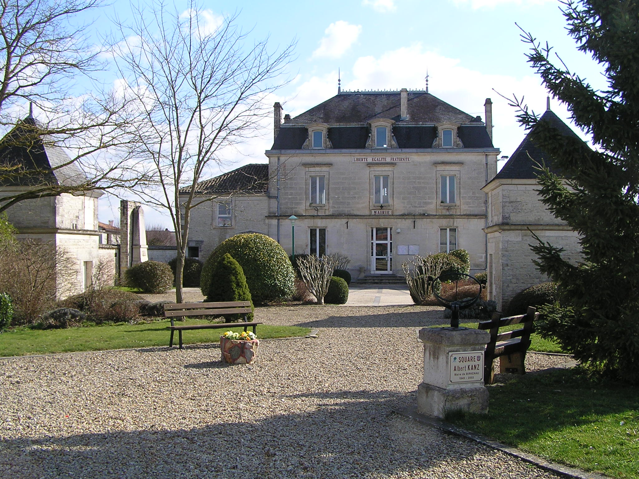 mairie de Brie (Charente)